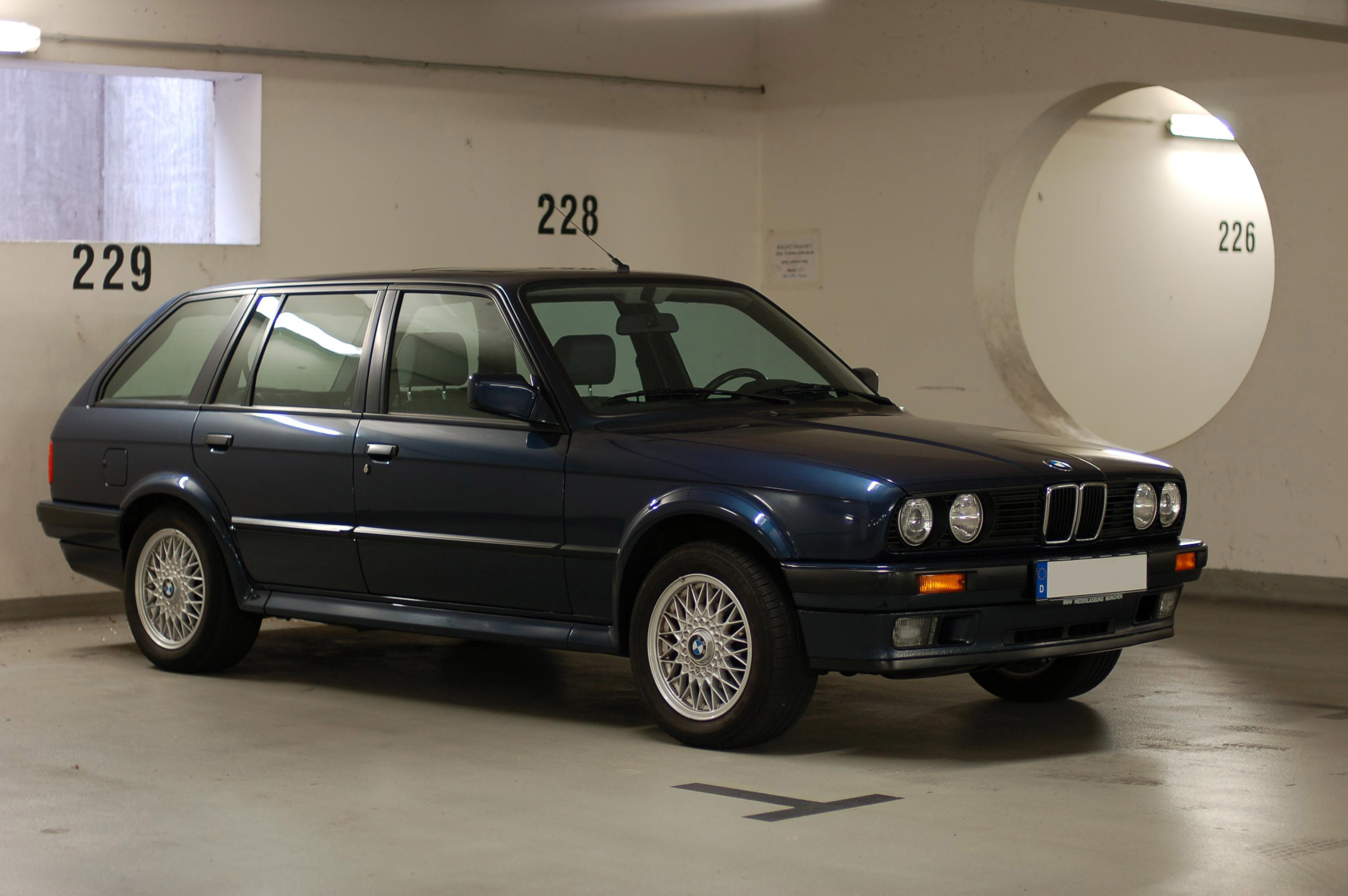 325ix Touring in lazurblau ! 2007 waren noch 1050 beim Strassenverkehrsamt zugelassen !